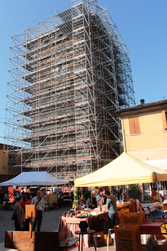 Torre dei Modenesi This is a photo of a monument which is part of cultural heritage of Italy.